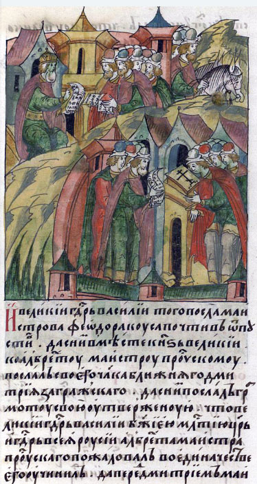 Посольство в Тевтонский Орден - 1517 год. Для ратификации договора вслед за Шонбергом 26 марта 1517 года отправилось посольство во главе с Дмитрием Давыдо­вичем Загряжским. Его помощники — подьячий Григорий Шемет Воробьёв (для письма) и «толмач Митя» — перево­дчик Дмитрий Герасимов (Russkaya letopisnaya istoriya Kniga b.18 p.302).